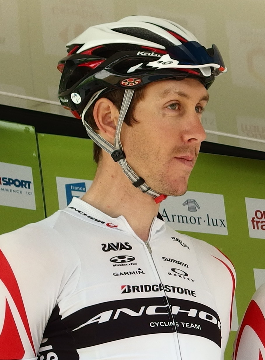 Tour de Bretagne 2015 - Présentation des équipes au départ de la troisième étape à Baud - Équipe Bridgestone Anchor Depicted person: Damien Monier